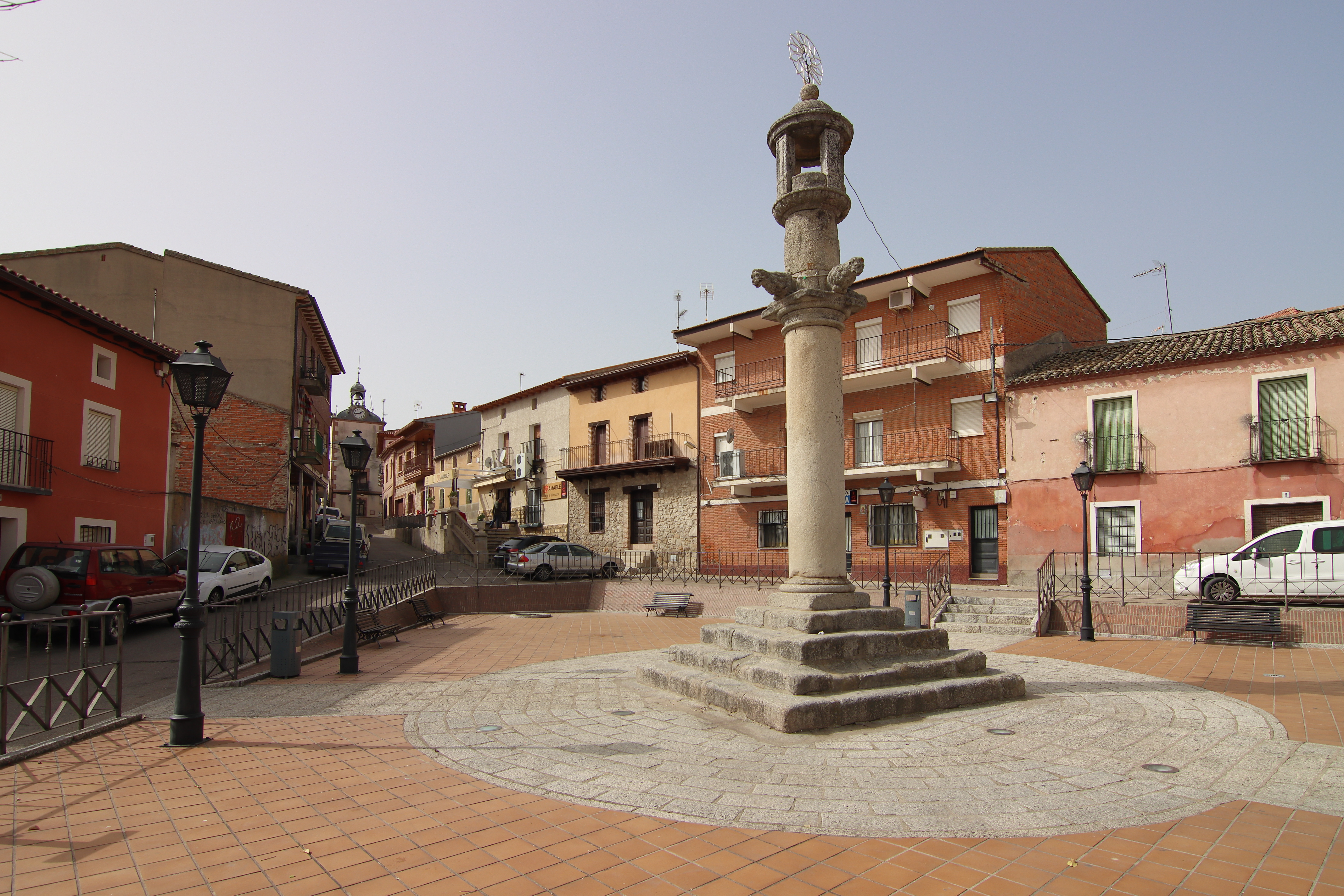 Picota o rollo, plaza de la Constitución, Nombella